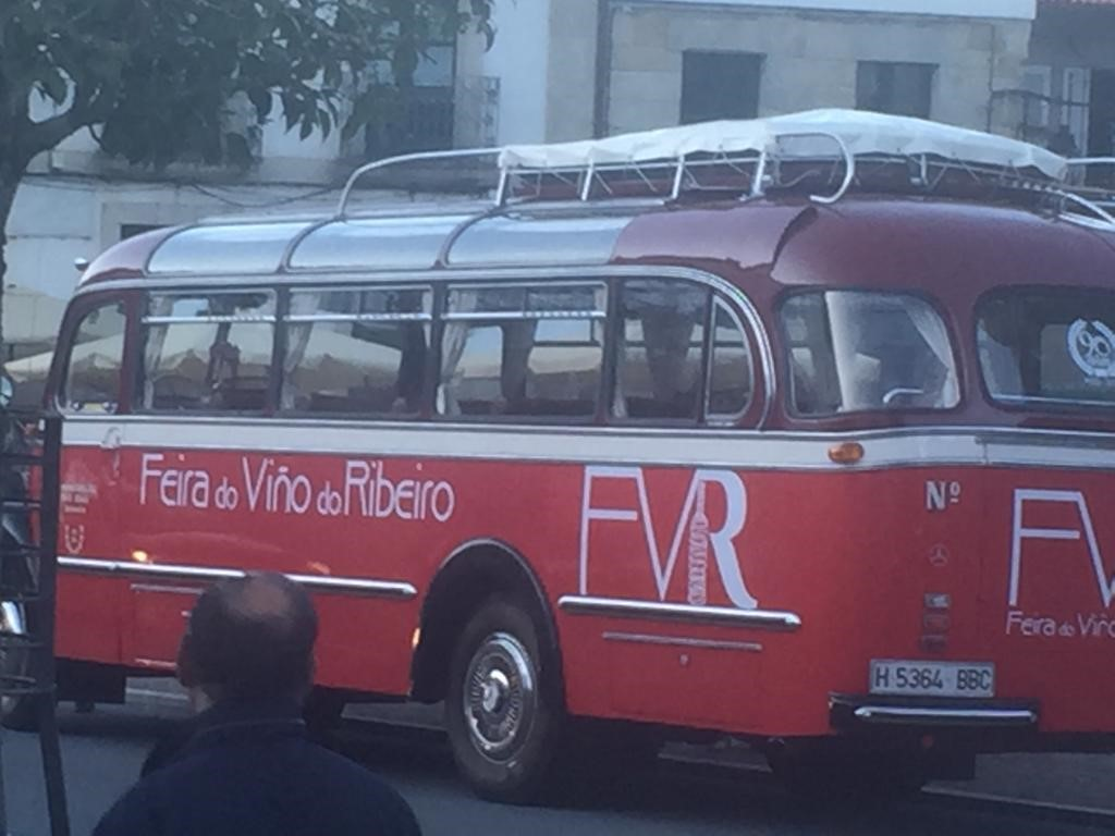 Bus de ruto polas viñas do Ribeiro